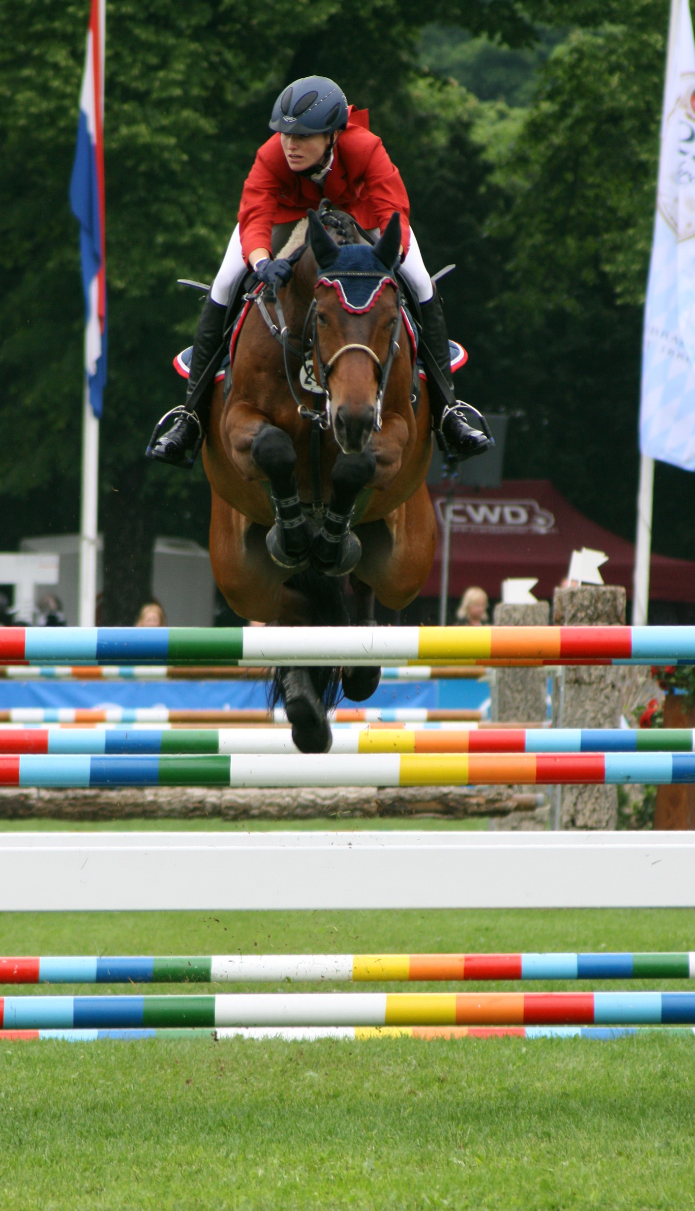 Springreiten Simone Blum auf Pferd Flying Boy (Hannoveraner) auf der Veranstaltung Pferd International 2011